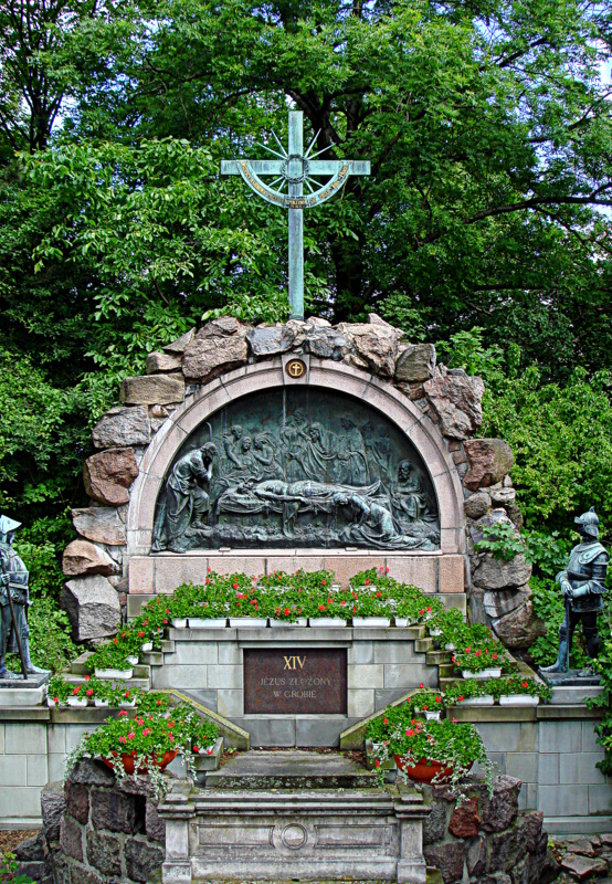 Zespół klasztorny oo. Paulinów: Kościół pw. Wniebowzięcia NMP i Znalezienia Krzyża Św. z kaplicami, zakrystią, skarbcem, wieżą, klasztorem, zabudowaniami gospodarczymi, arsenałem, drukarnią, domem muzykantów, twierdzą z bramami i bastionami, park Częstochowa, Częstochowa 02.1978.